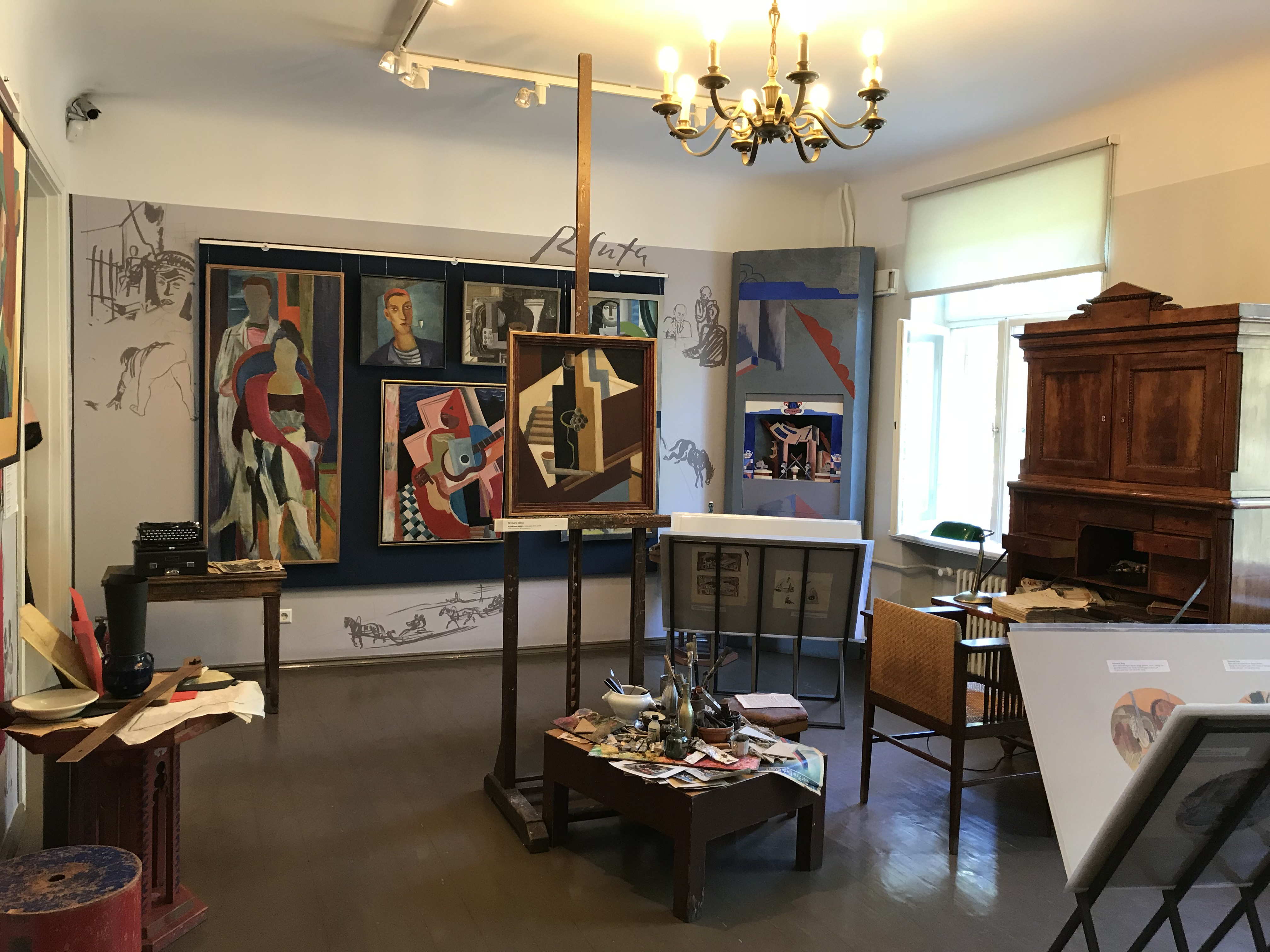 Romans Sutas och Aleksandra Beļcovas museum i Riga, ateljé.